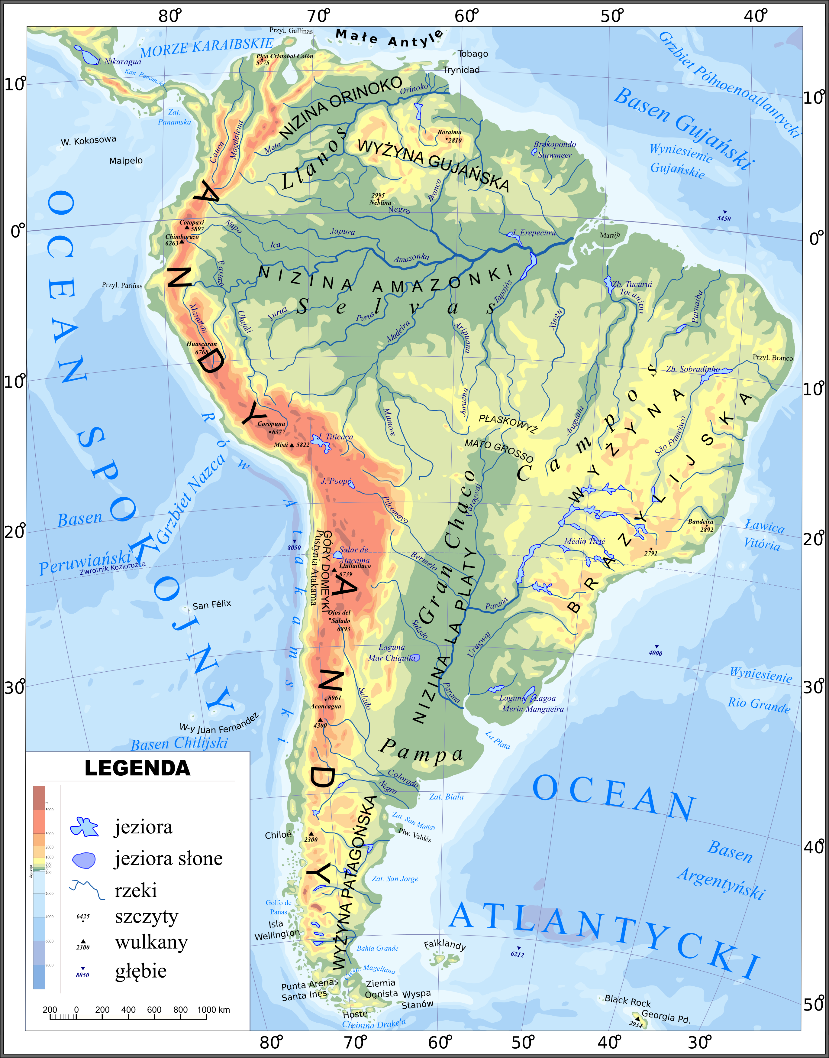 Mapa Hipsometryczna Ameryki Południowej (Odwzorcowanie równopowierzchniowe, azymutalne, poprzeczne)